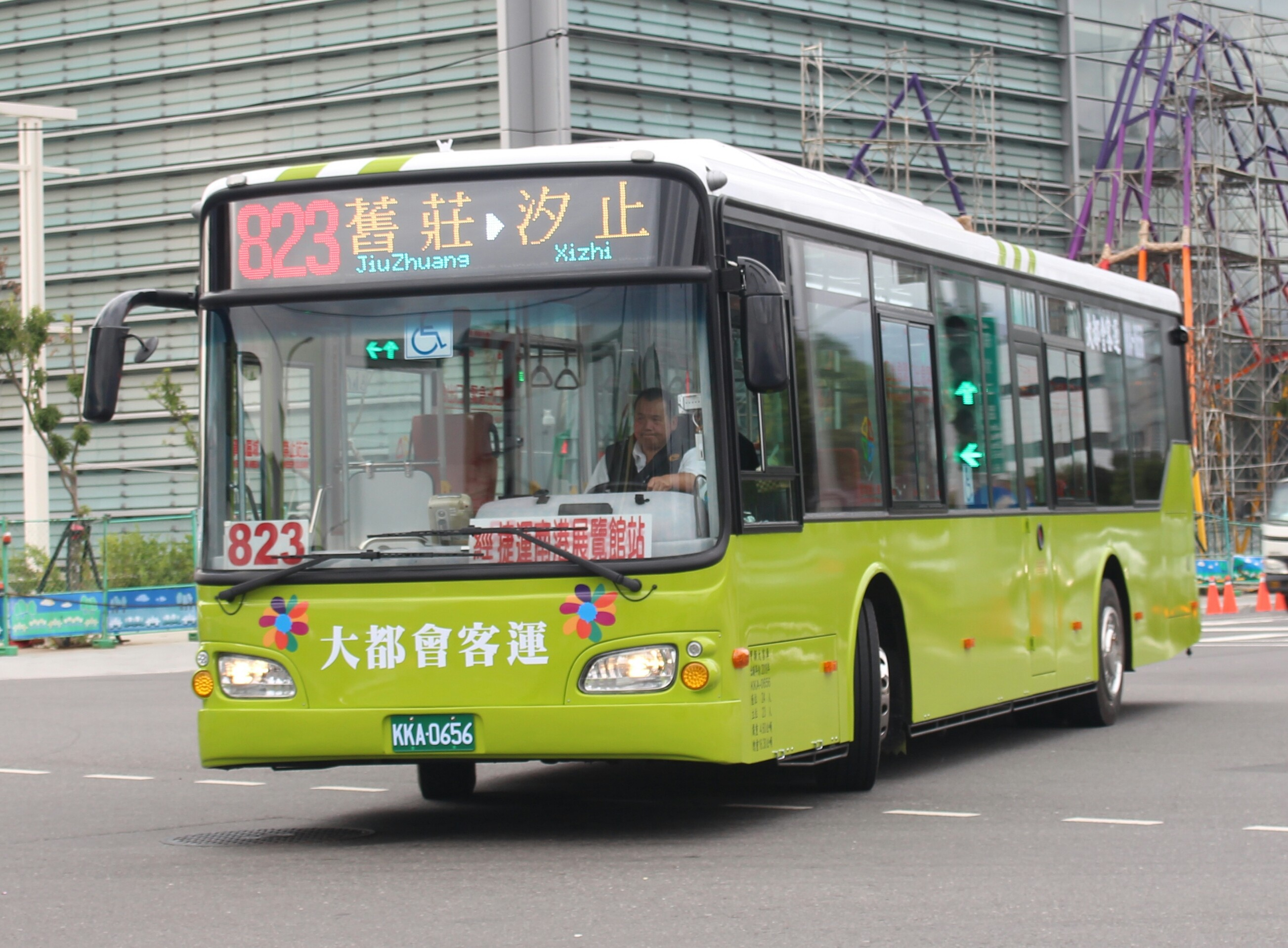 大都會客運2018 HINO HS8JRVL-UTF 弘鉅車體 KKA-0656 823